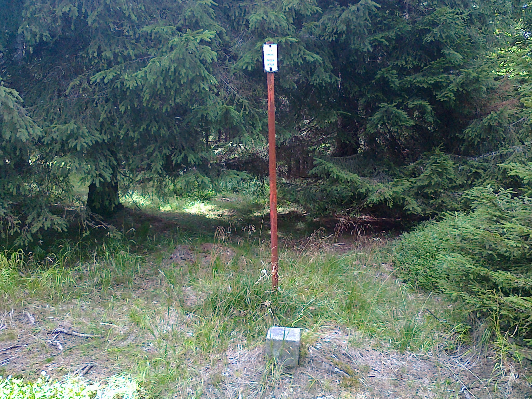 Punkt geodezyjny na połaci szczytowej góry Troják-SZ - 1044 m n.p.m.